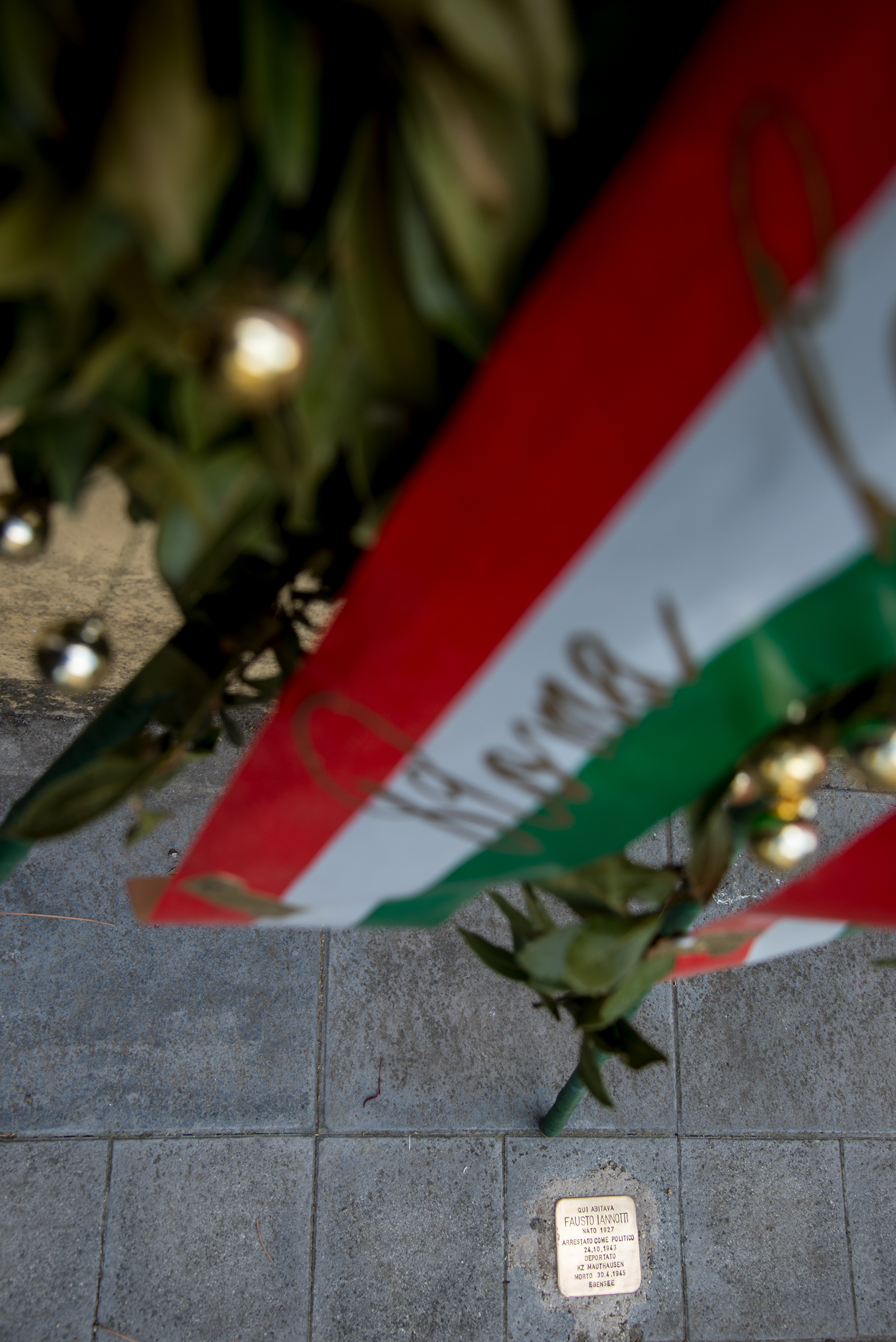 Stolperstein in Rom